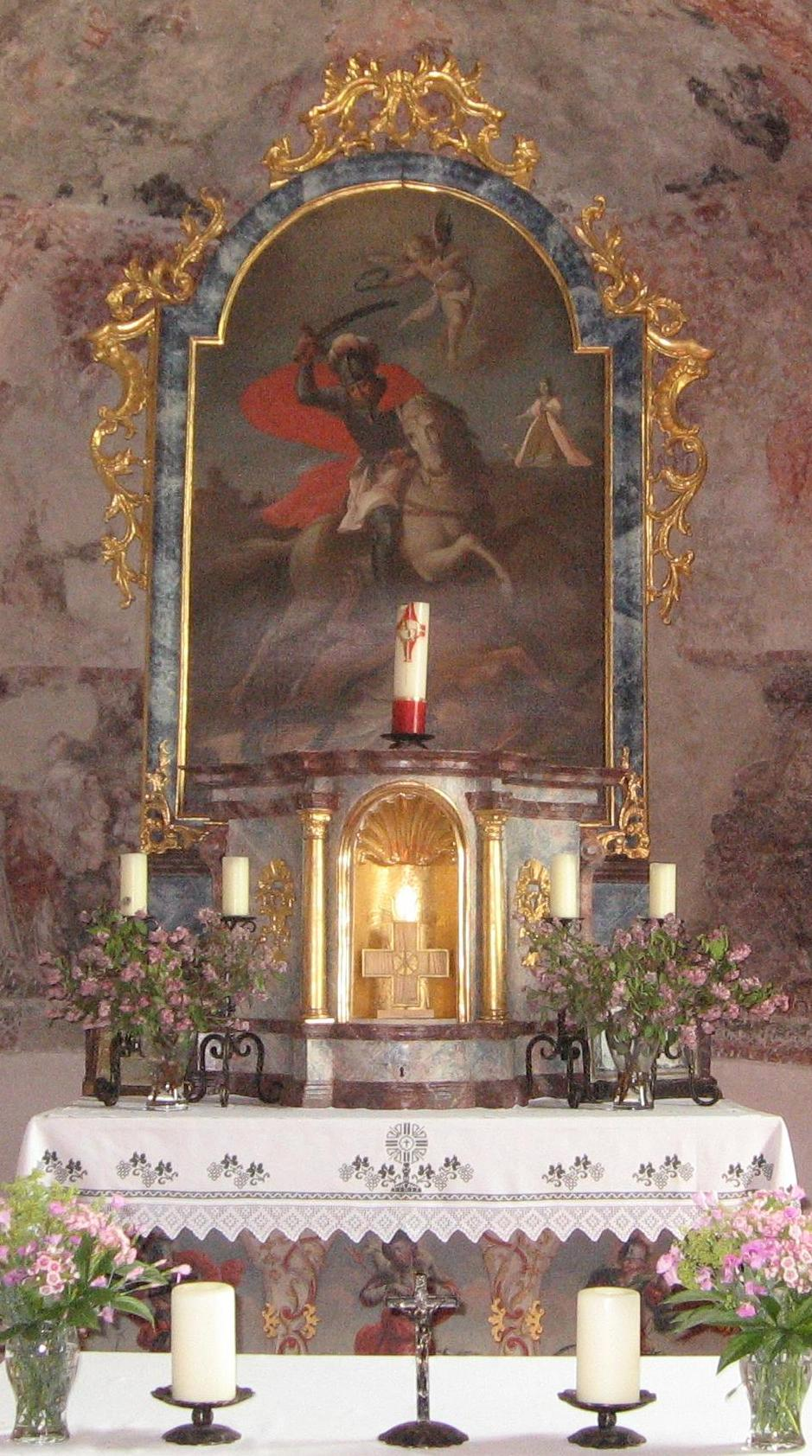 Altar inside Saint George church on Danielsberg, 1633.